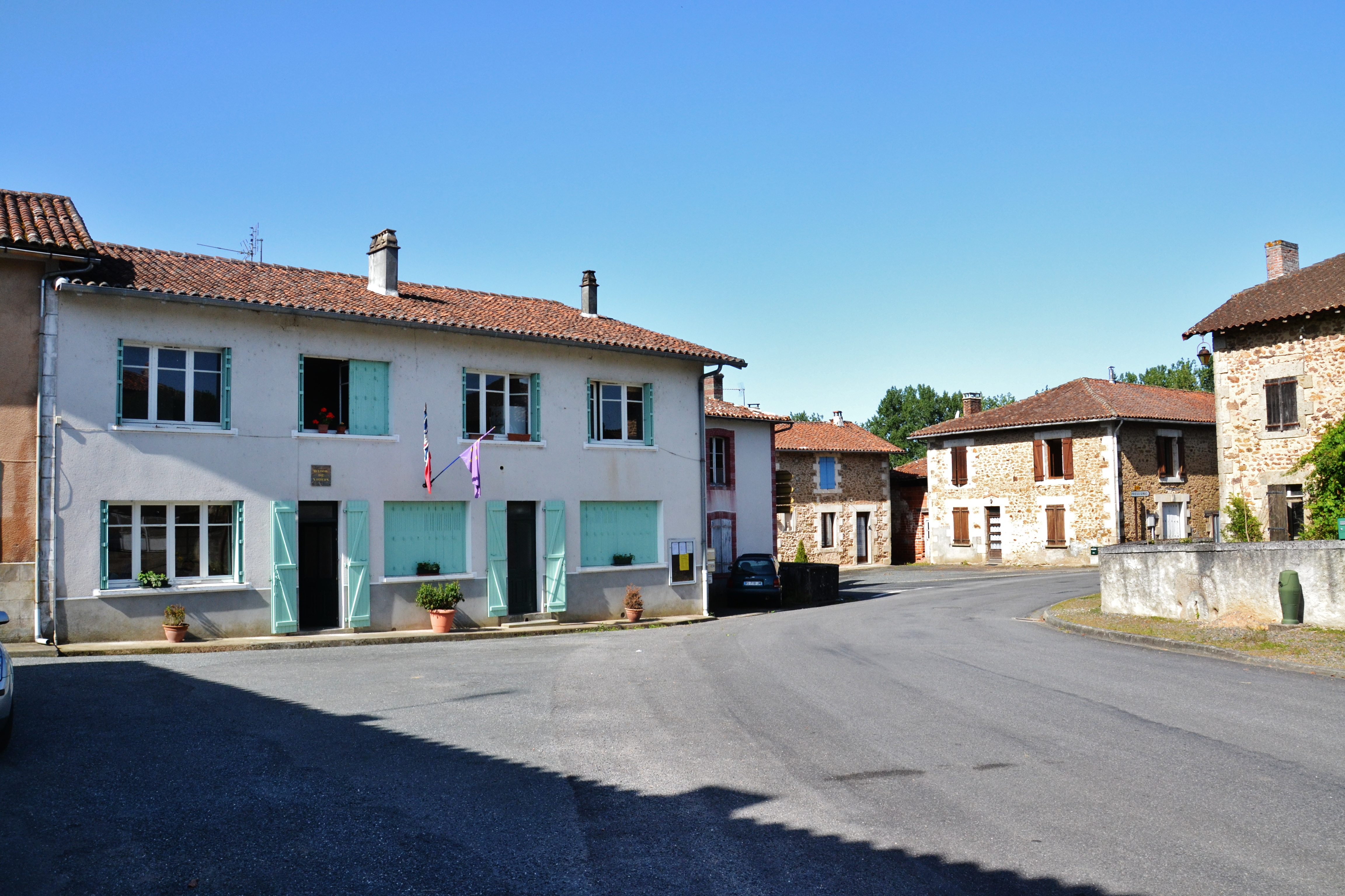 Le centre-bourg de Videix (Haute-Vienne, Charente)